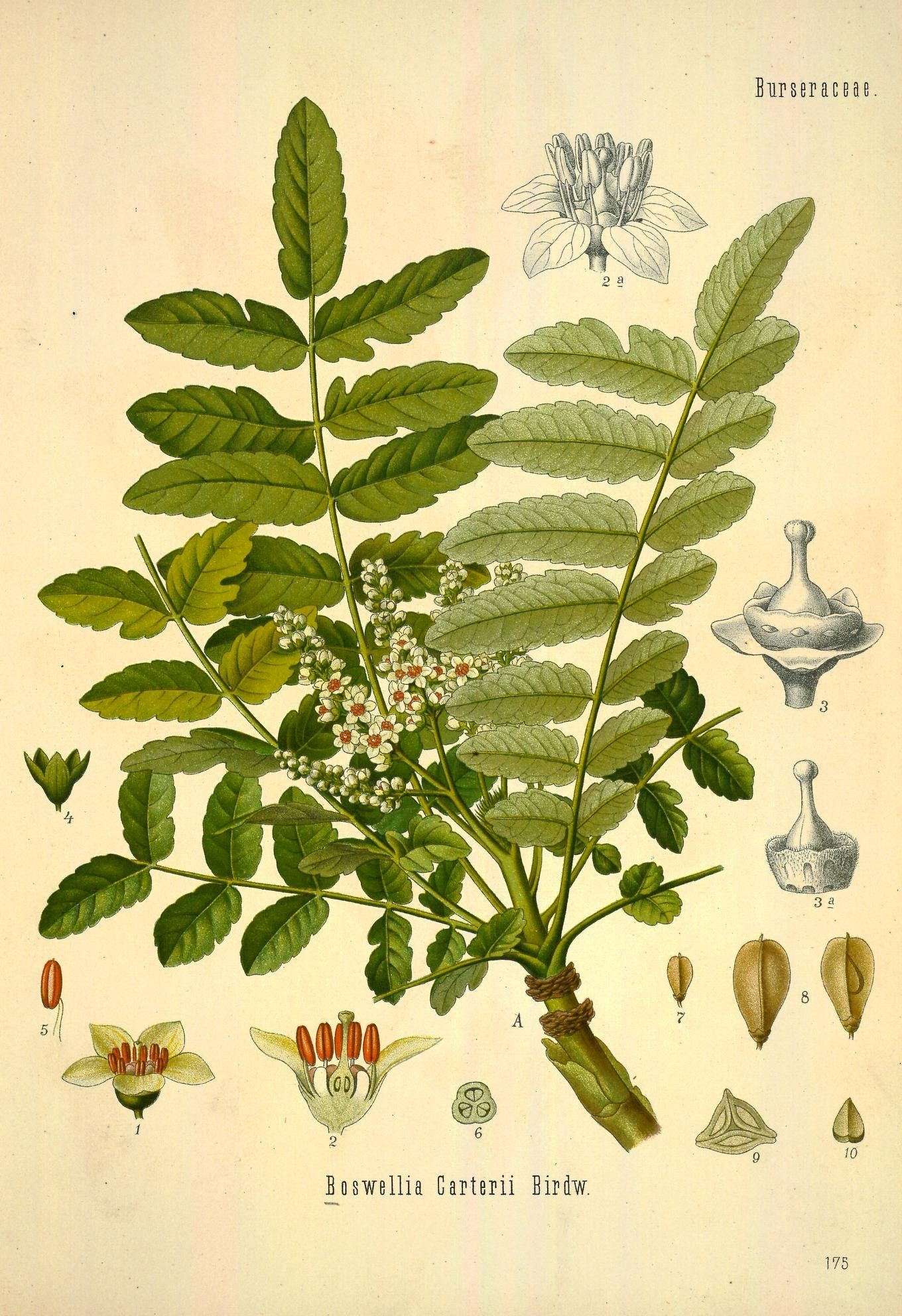 Burseraceae. B o swellia Garterii Biriw.